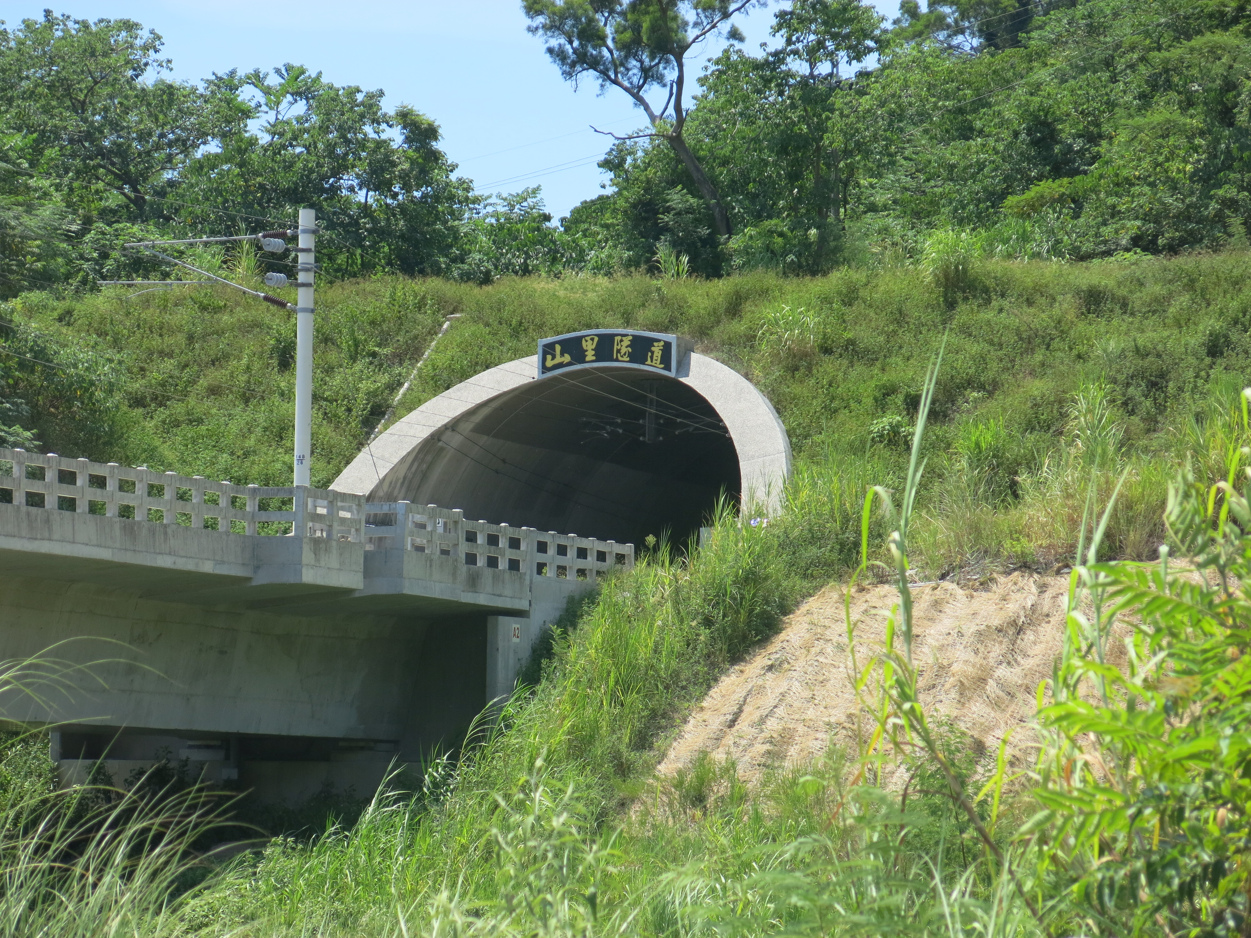 中文（台灣）: 台鐵新山里隧道北口